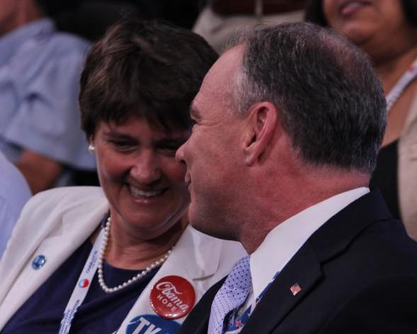 2012dncconvention-191